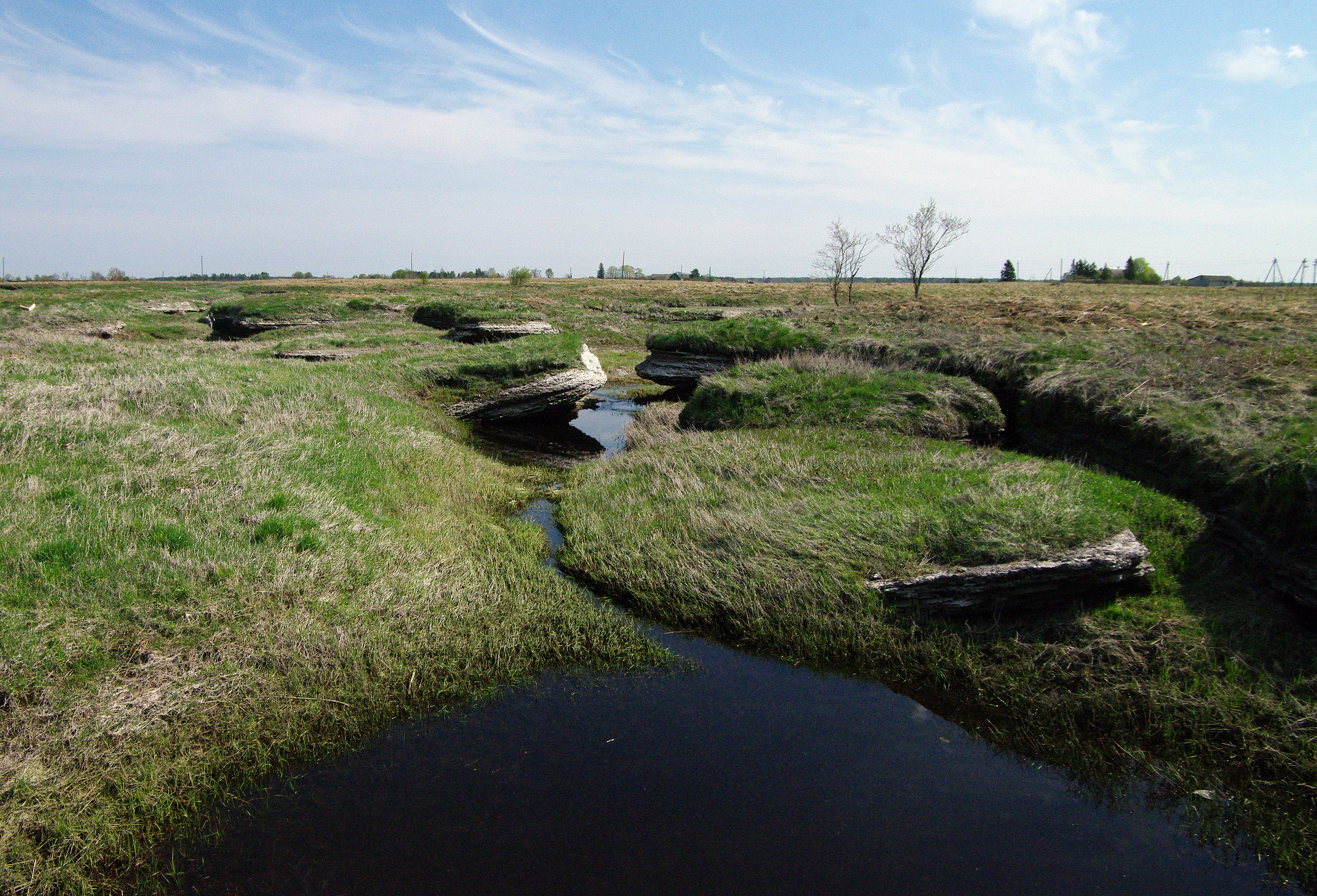 Kostivere karstiala